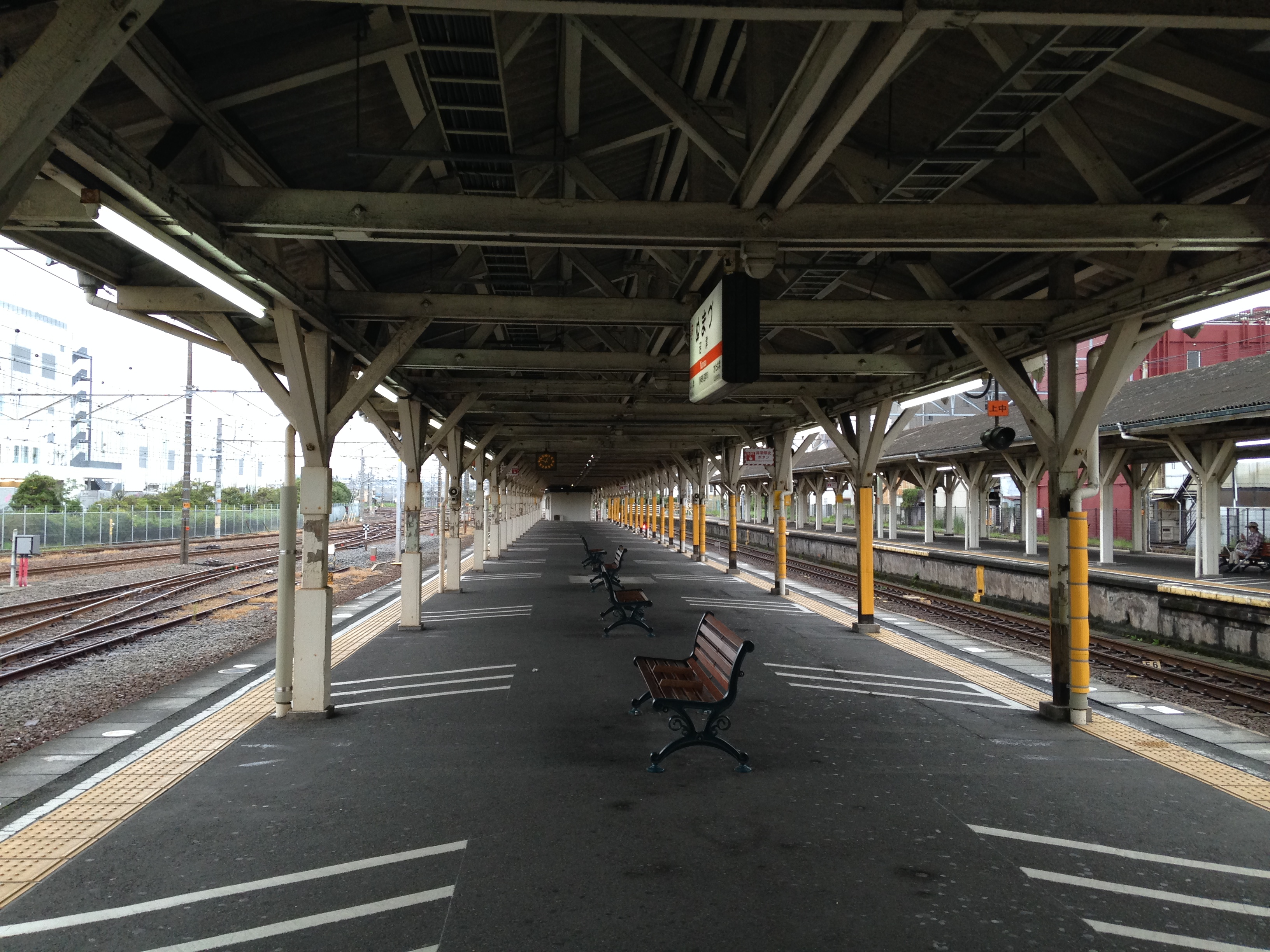 沼津駅の東海道本線ホーム。奥は三島方面